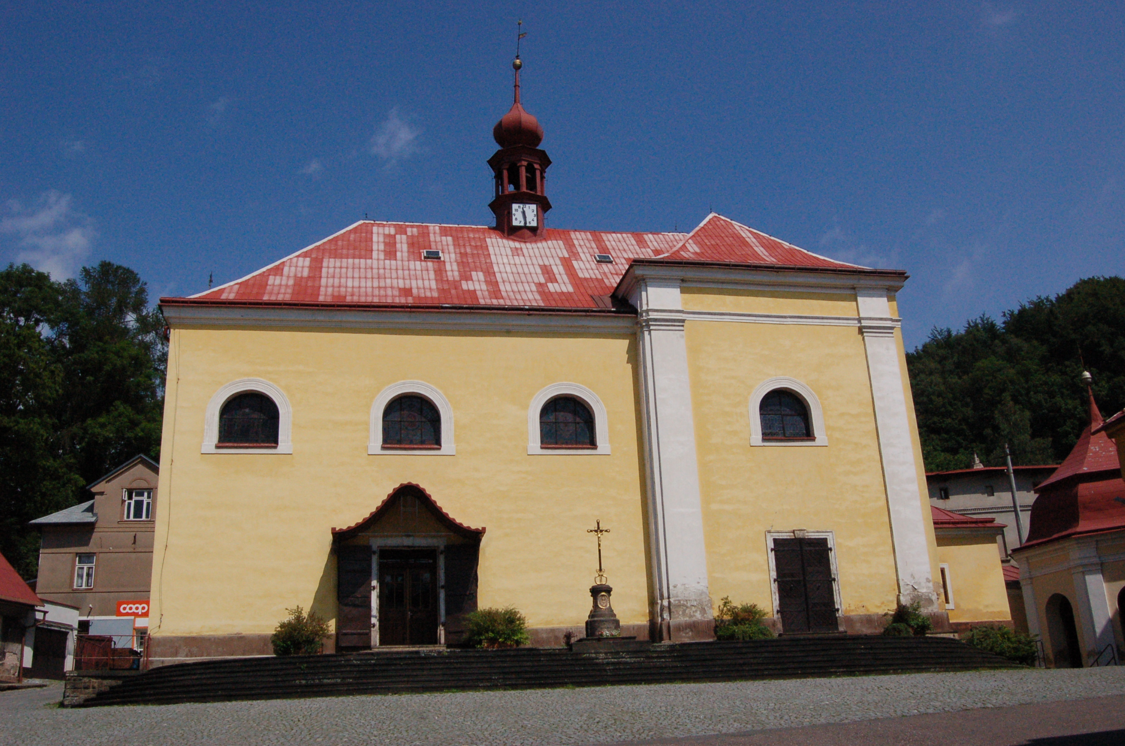 Kostel v Malých Svatoňovicích na Trutnovsku.